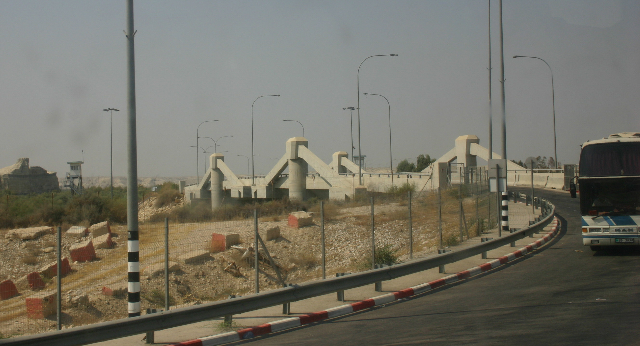 neue Allenbybrücke